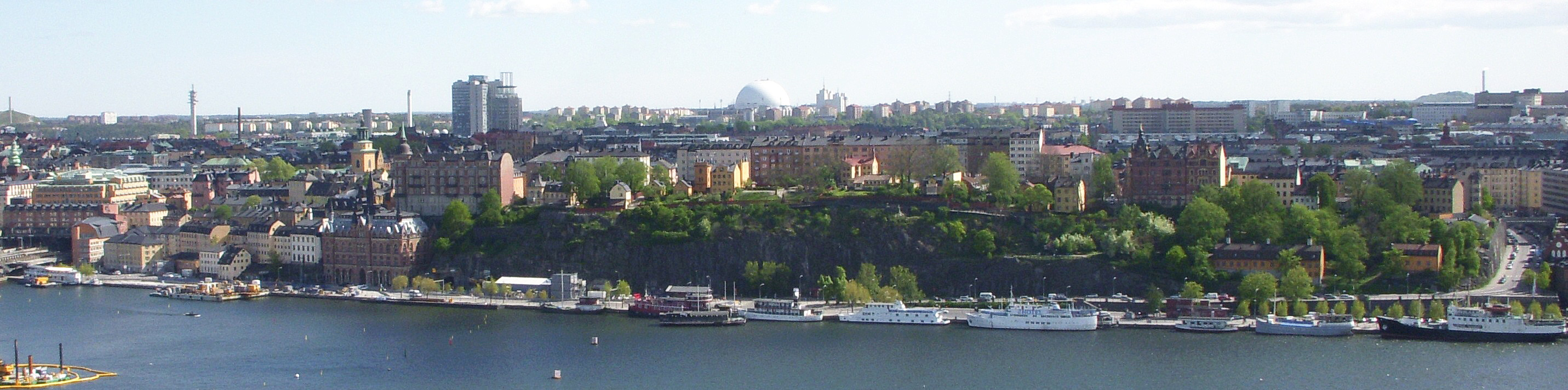 Mariaberget på Södermalm, Stockholm, vy från Stadshuset